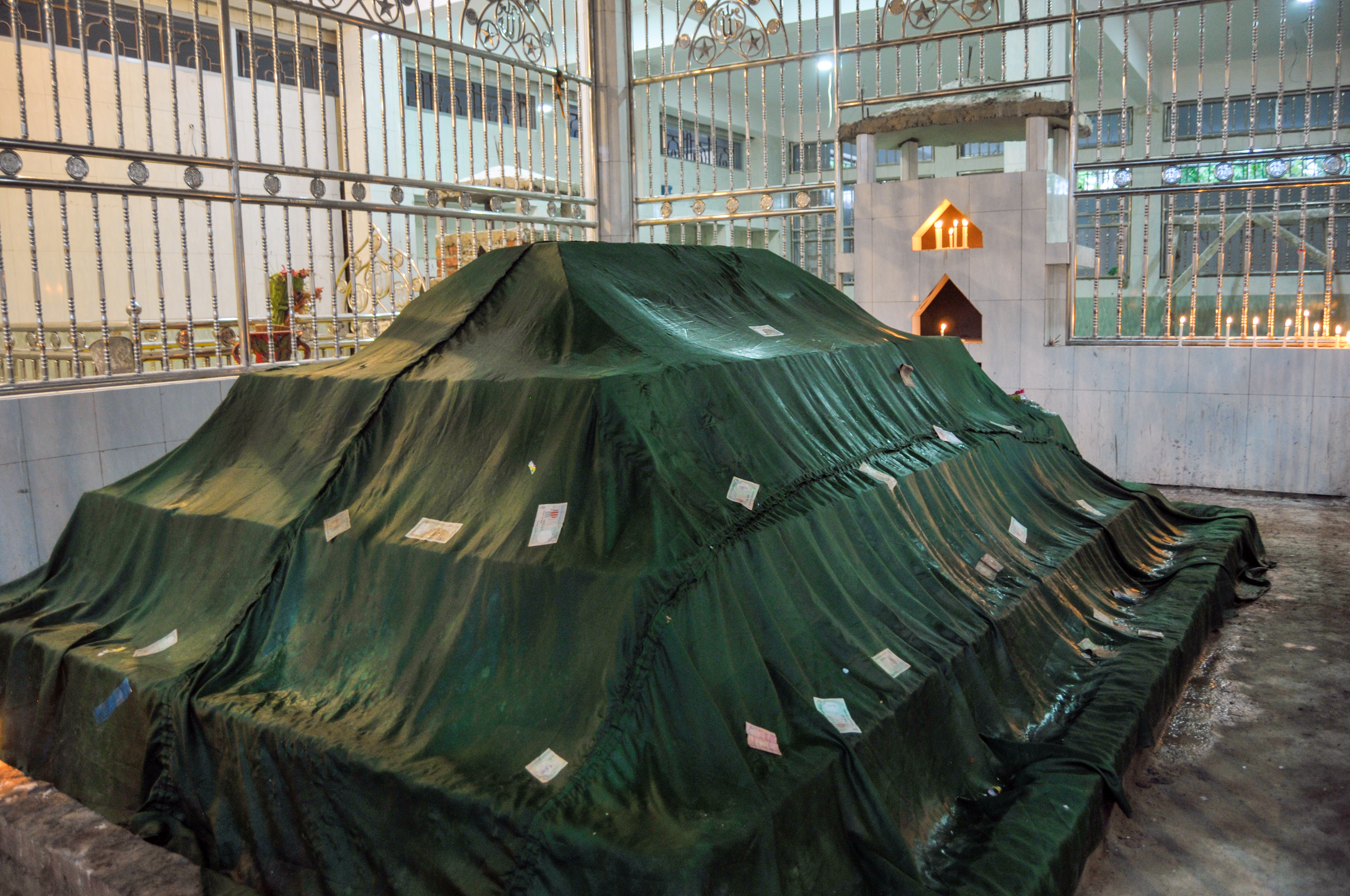 গাজী বুরহান উদ্দীনের মাজার